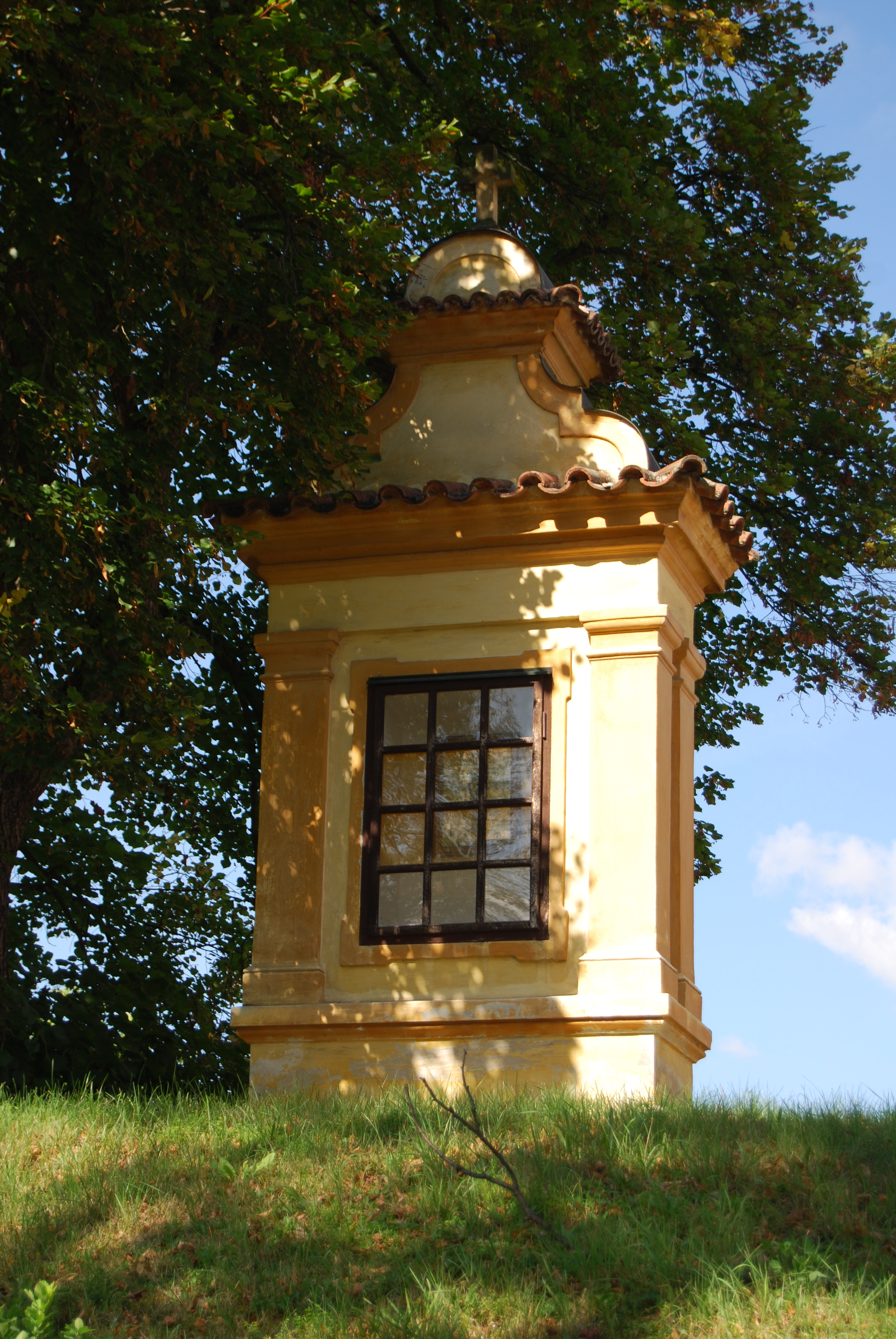 Výklenková kaple Panny Marie Sepekovské v Sokolovské ulici před domem čp. 590. Milevsko. Okres Písek. Česká republika.